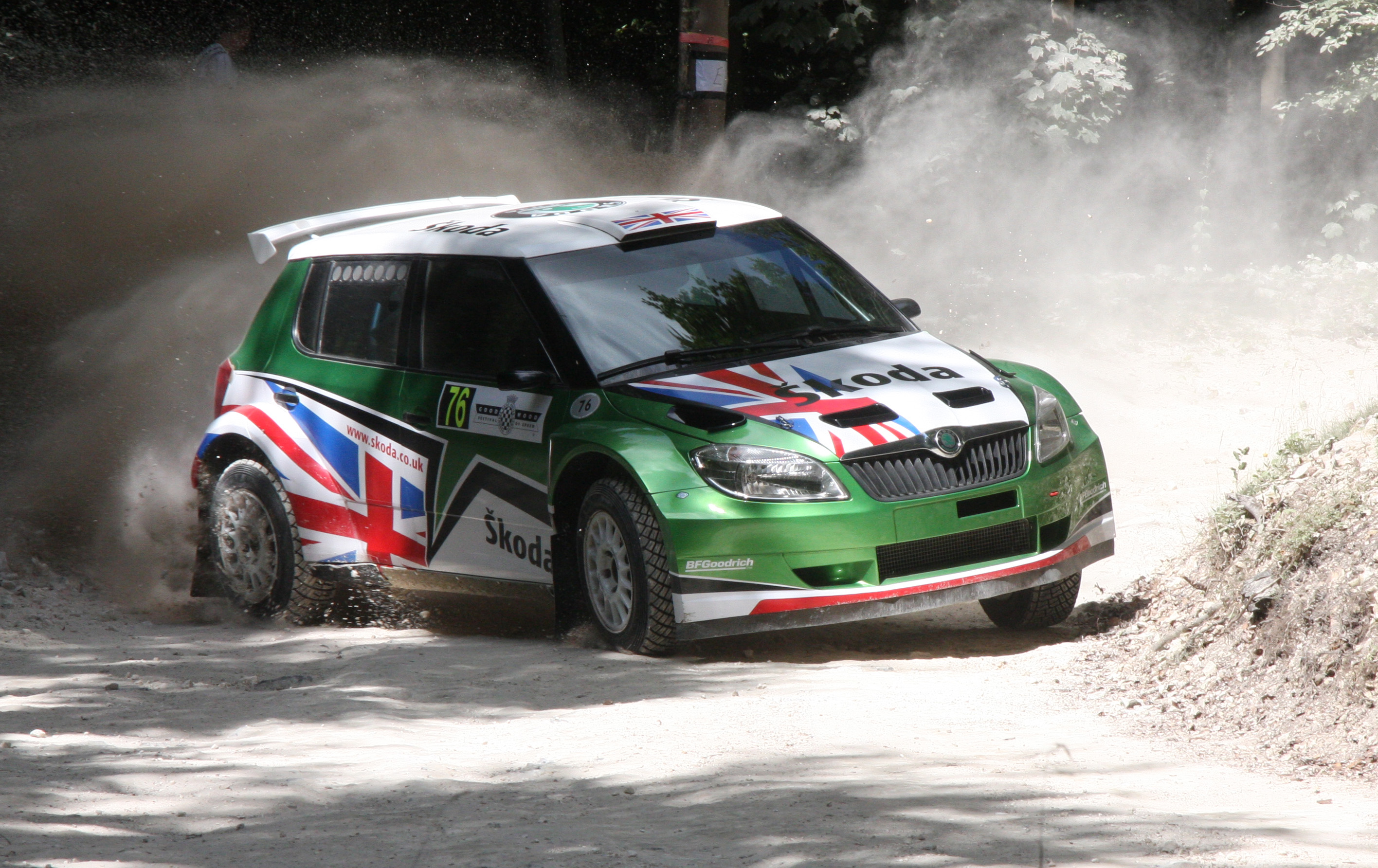 2010 Skoda Fabia S2000